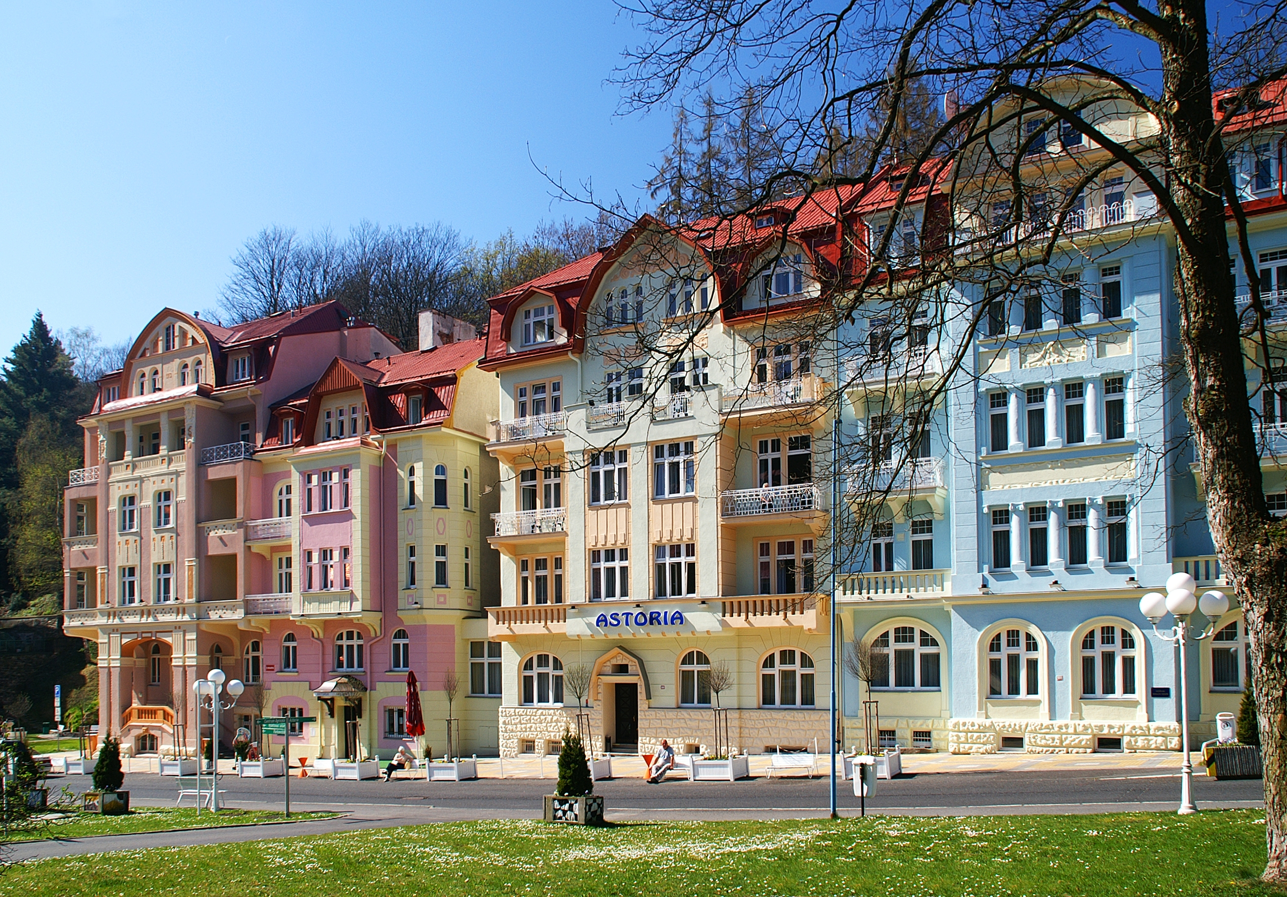 Lázeňský dům Astoria.